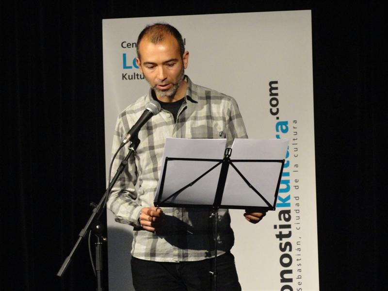 Antonio Casado da Rocha Literaktumen (2013).